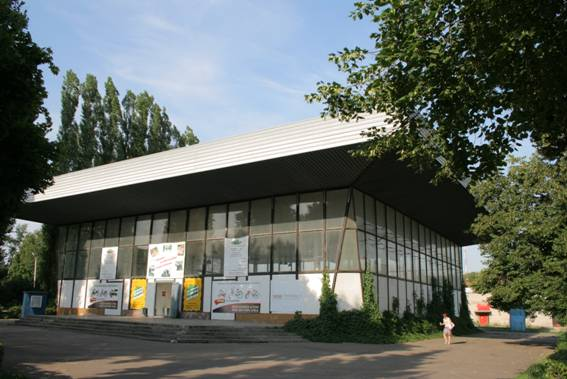 Липецк, Быханов сад, павильон